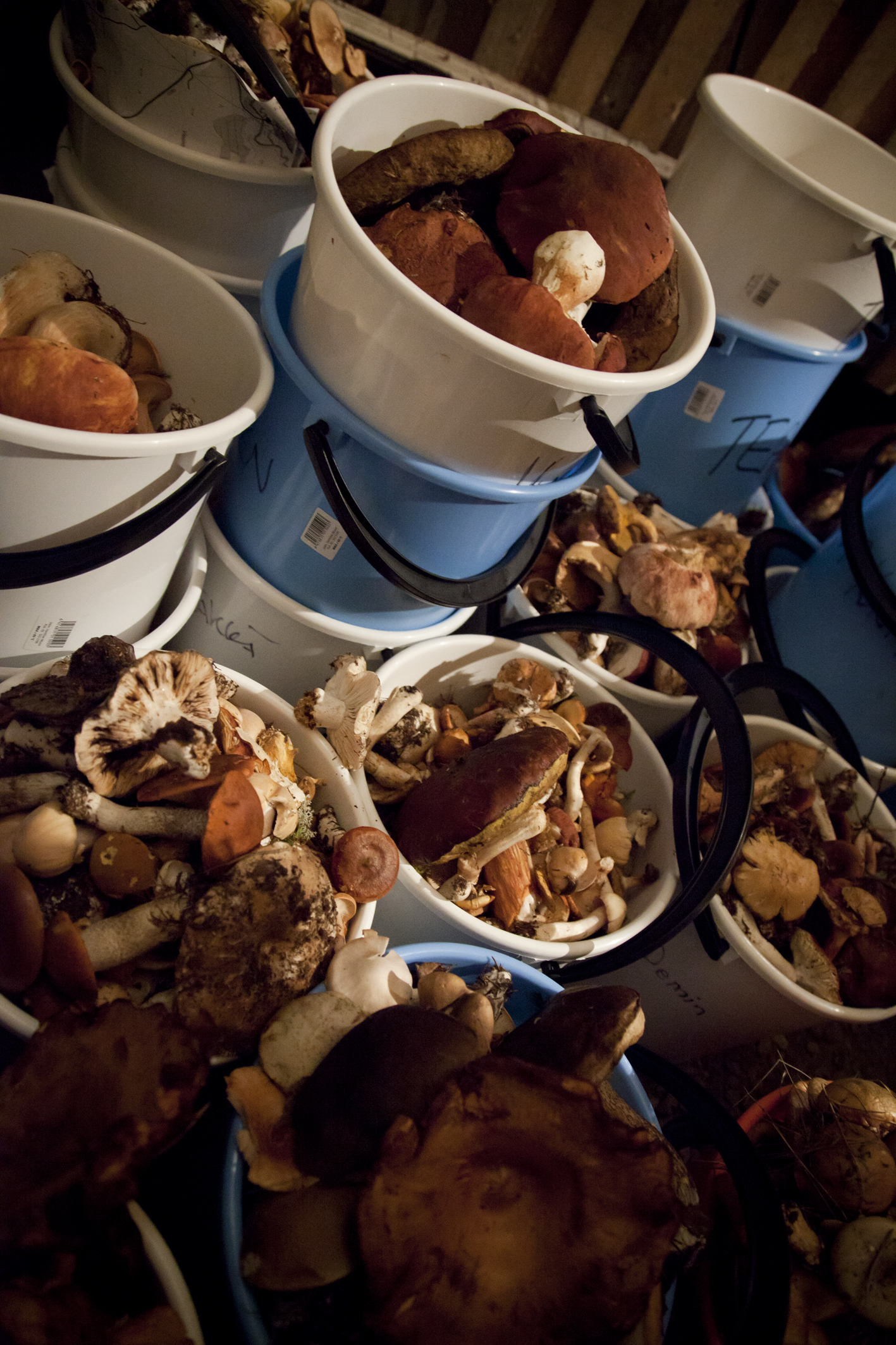 MM-tatti -kisojen yötatti-sarjan satoa vuodelta 2012.